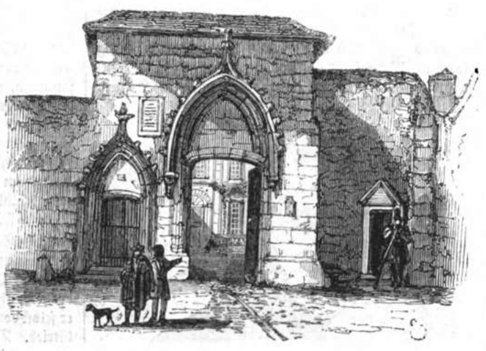 Das Hotel Panette in Bourges.